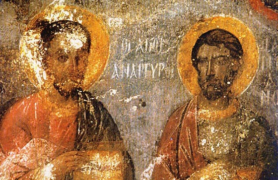 Фреска на Св. св. Козма и Дамян от едноименната църква в Карликьой, Серско